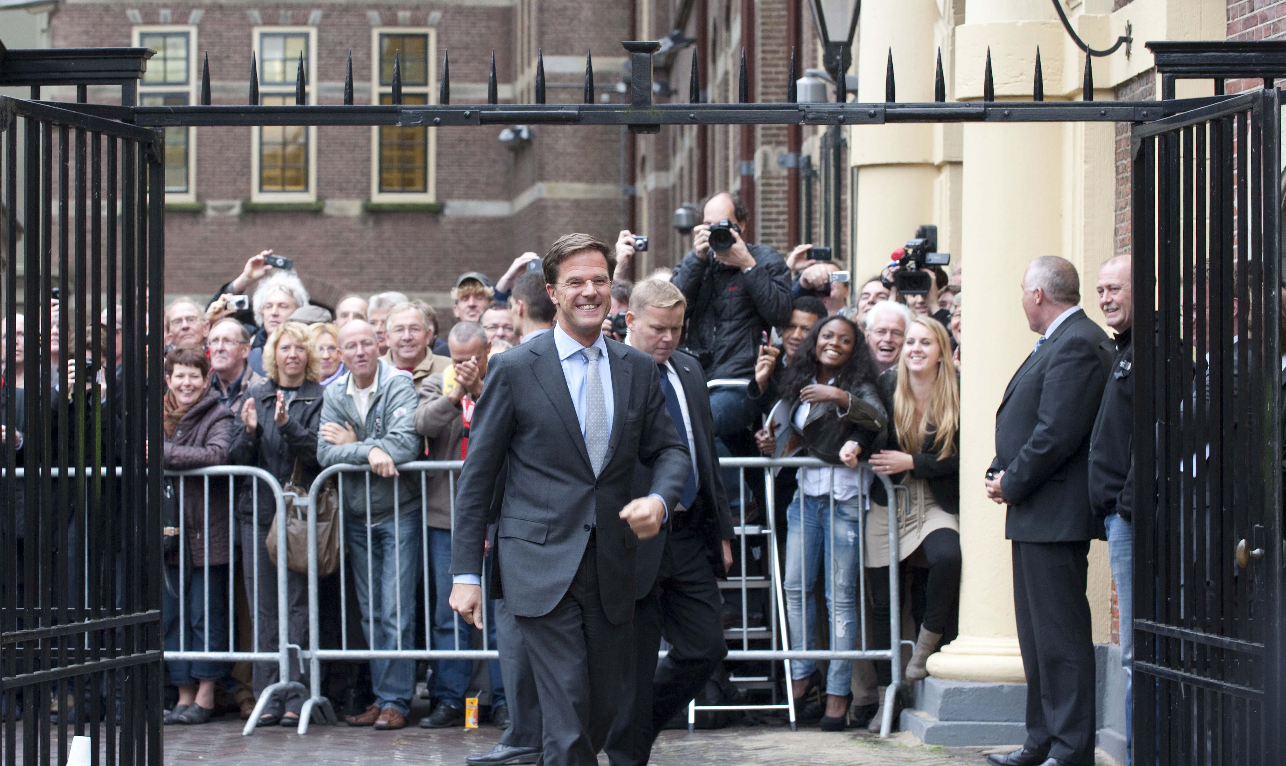 14/10/10: Mark Rutte glimlacht naar scheidend premier Jan-Peter Balkenende